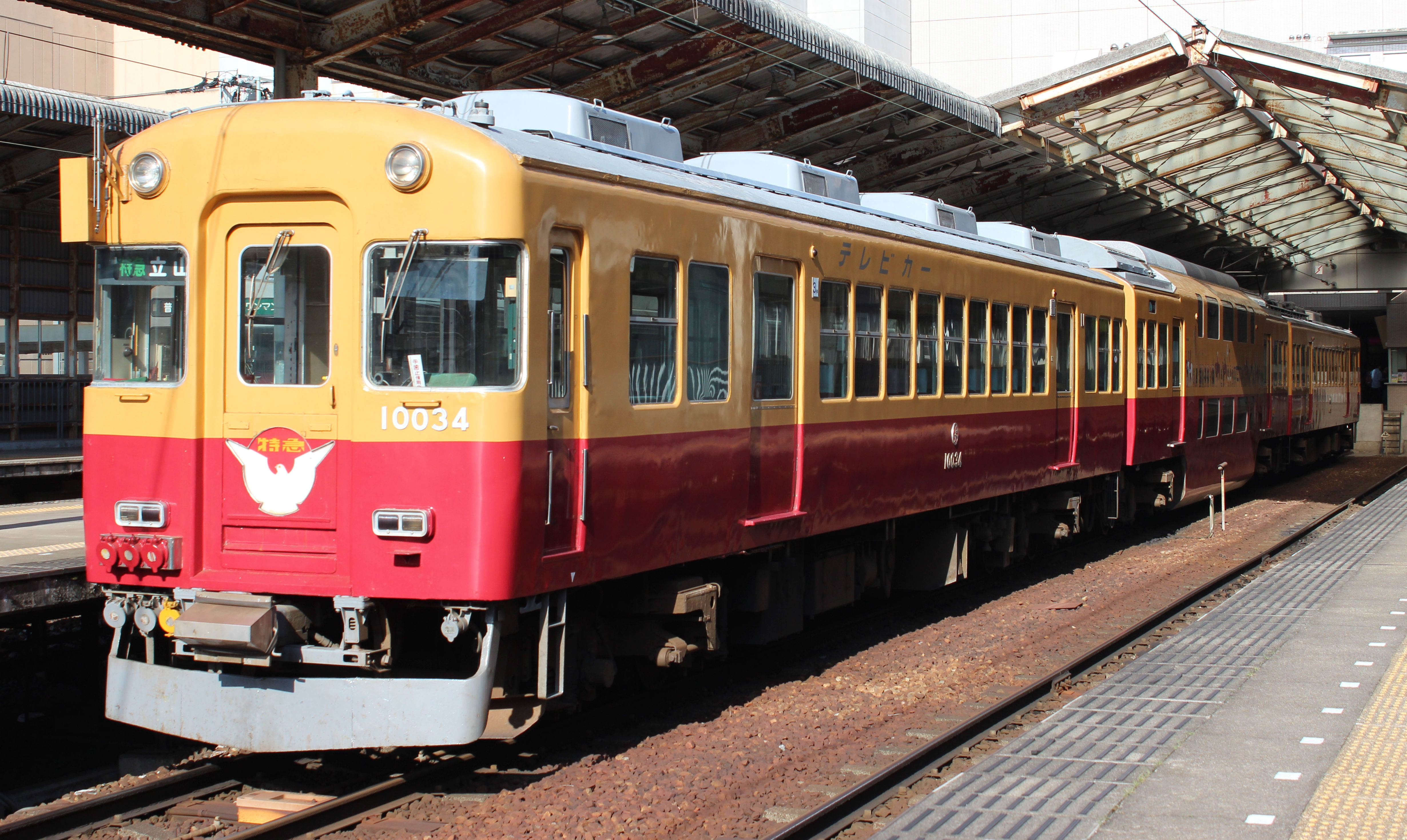 富山地方鉄道10030形電車